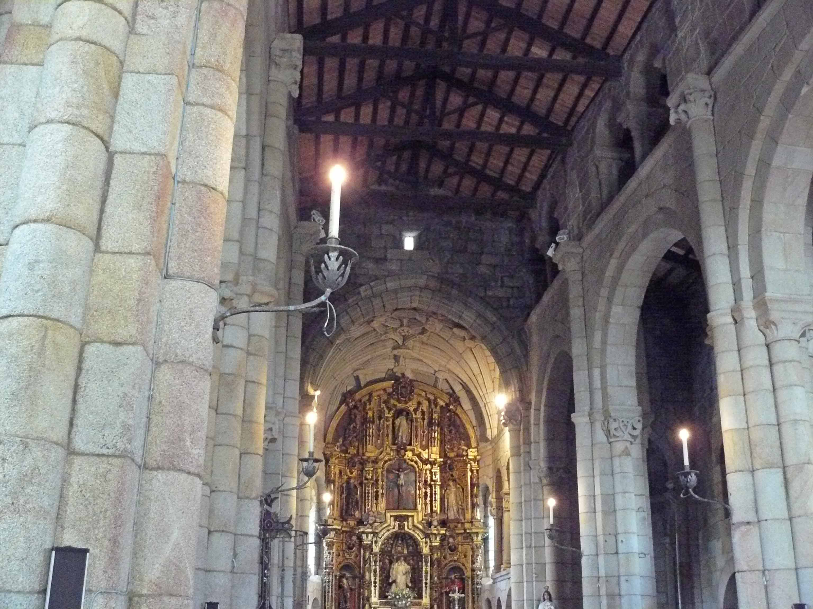 Nave central da Igrexa do Mosteiro de Aciveiro